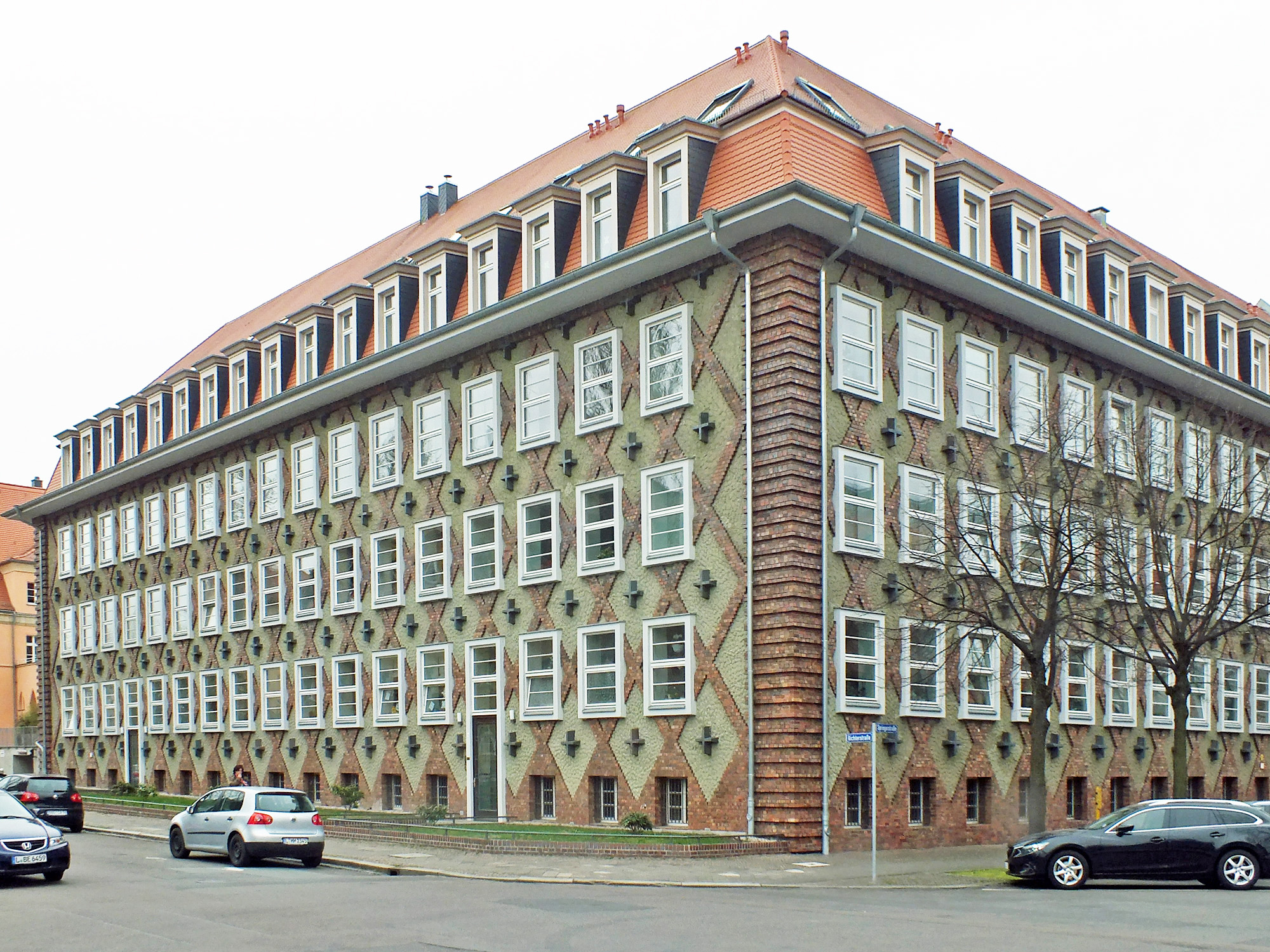 Das ehemalige Funkhaus Springerstraße in Leipzig, jetzt Wohnanlage